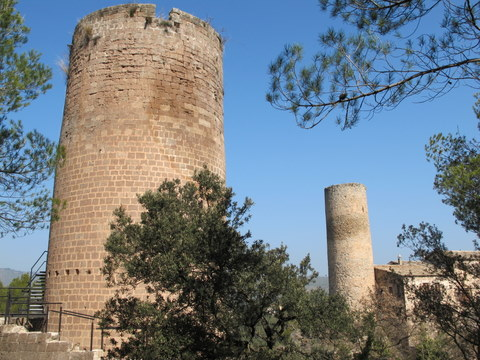 Castell de Fals - Catalunya